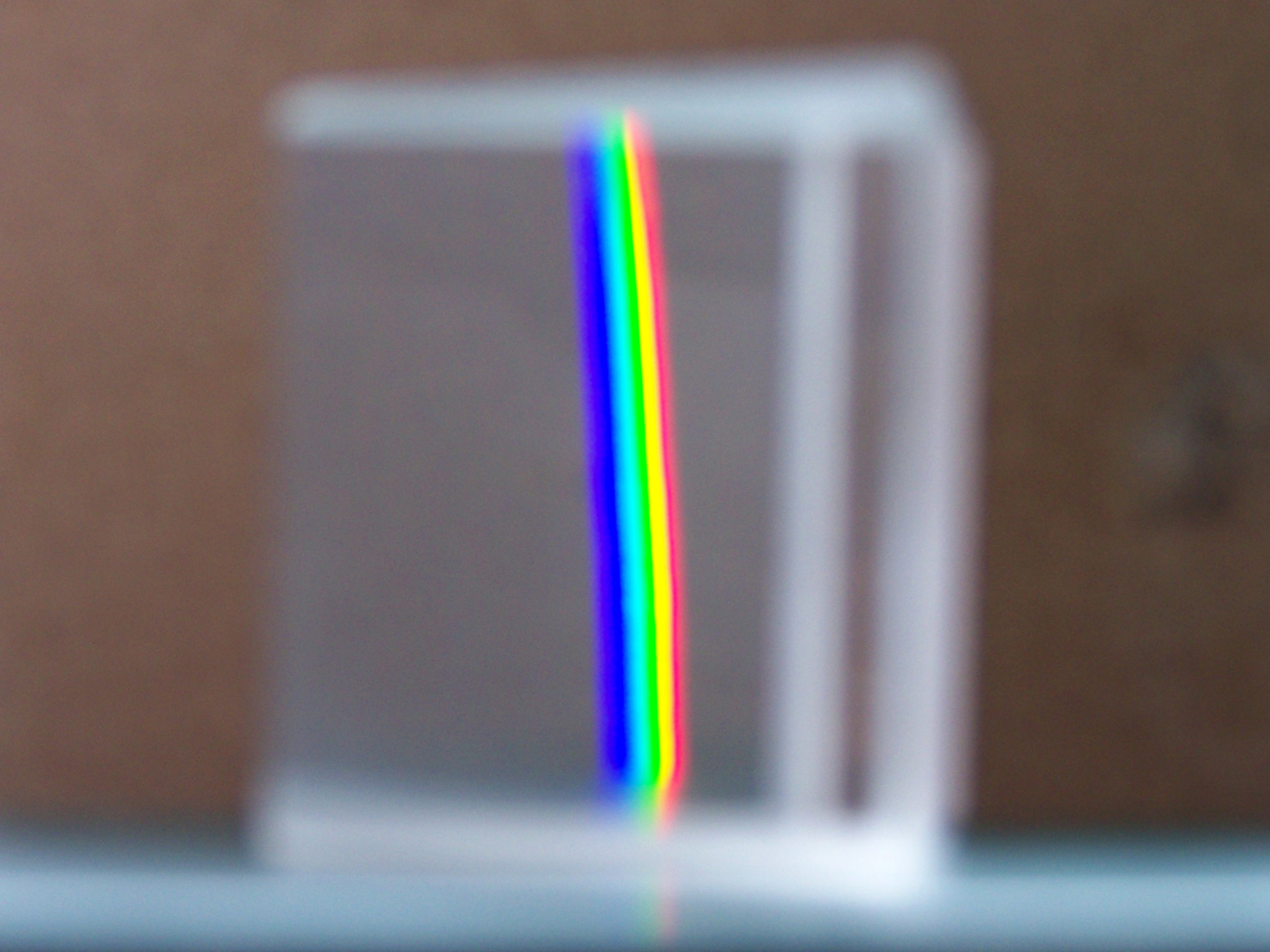 Widmo uzyskane za pomocą pryzmatu szklanego